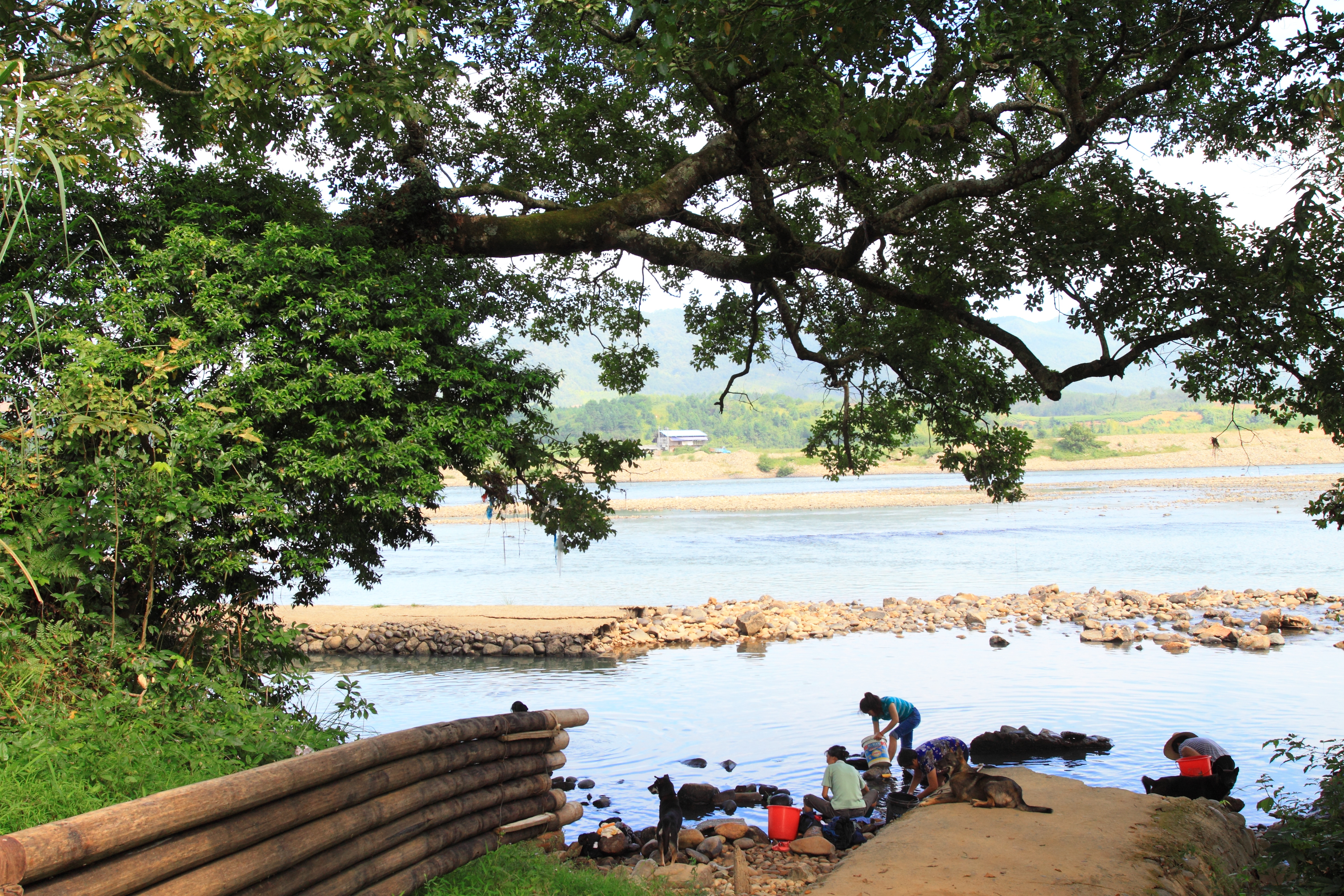 城村北部崇阳溪边